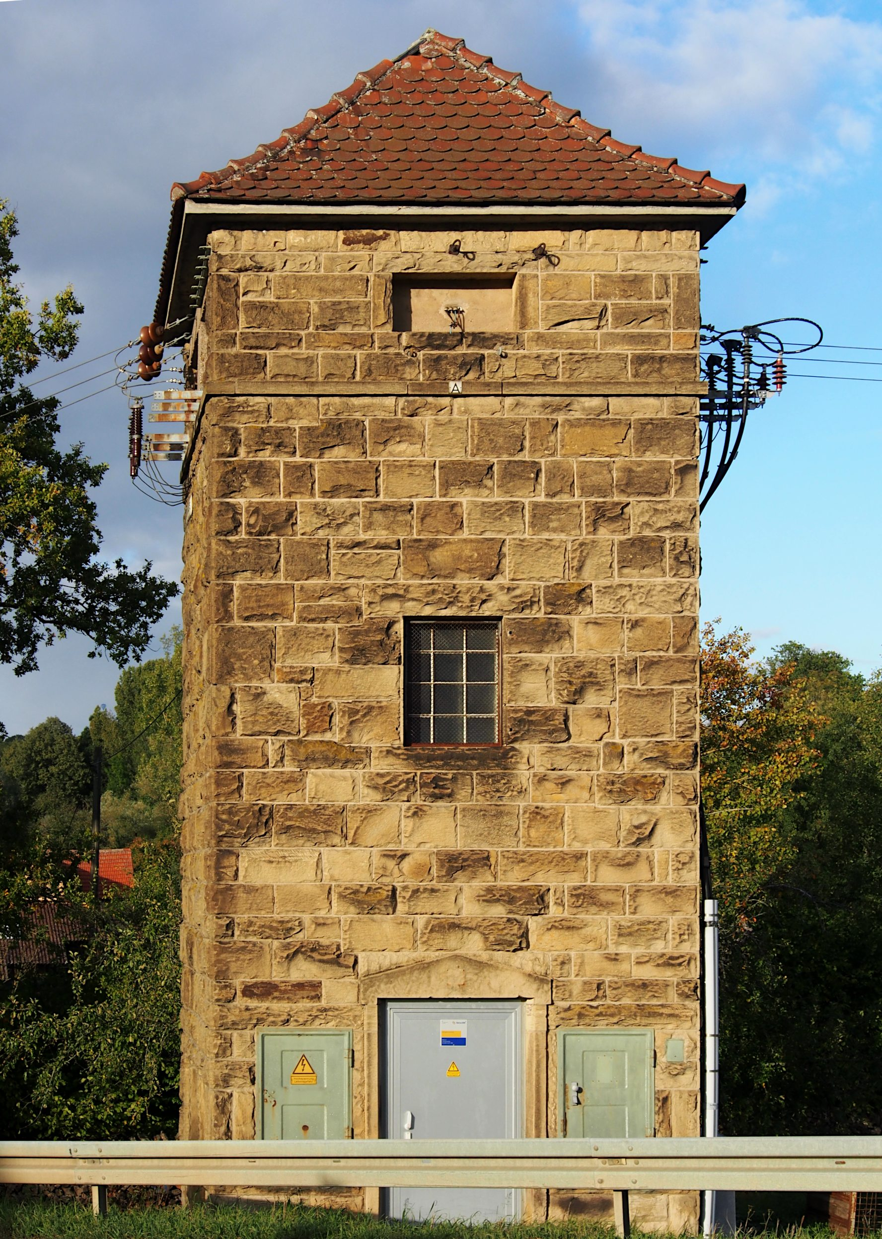 Transformatorenstation aus Naturstein Von den vier Mittelspannung-Freileitungen ist eine abgebaut, eine in Erdkabel umgebaut. Die Niederspannungsabgänge gehen im Turm hinunter.